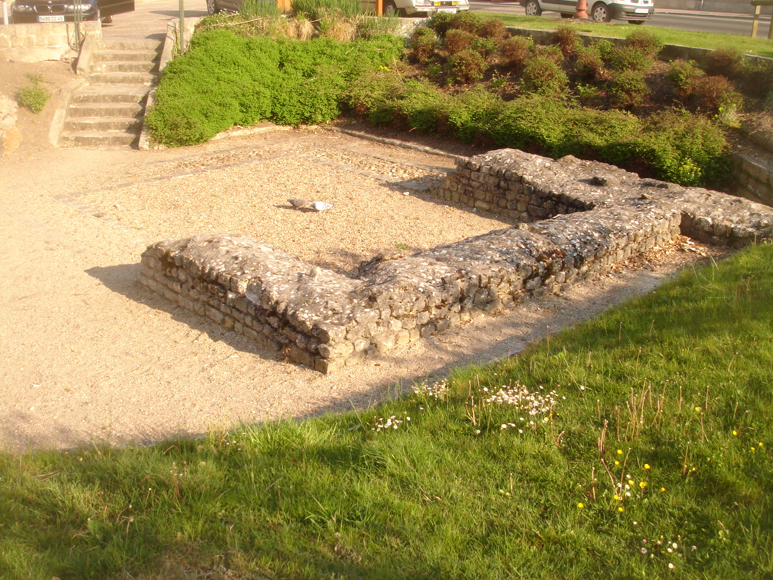 Site archéologique de Vienne-en-Val dans le centre du village